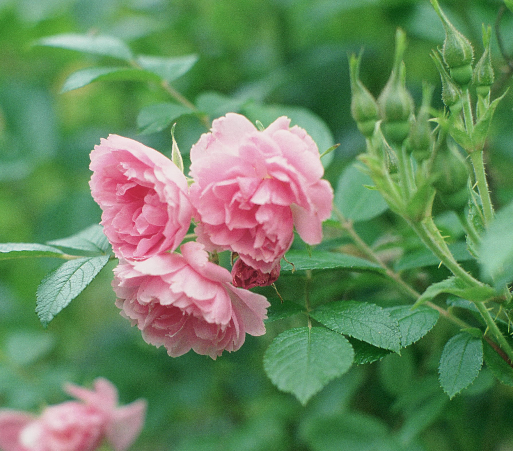 Rosa 'Pink Grootendorst', hybr. Rugosa, sect. Cassiorhodon. Real Jardín Botánico, Madrid